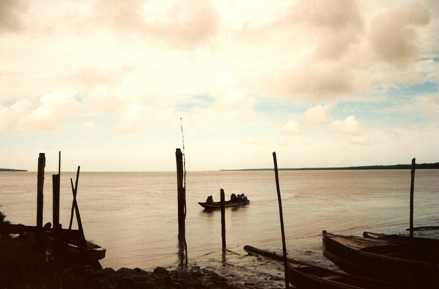 Nieuw-Amsterdam, Suriname, samenvloeiing van de Suriname- en Commewijnerivier. Eigen opname.